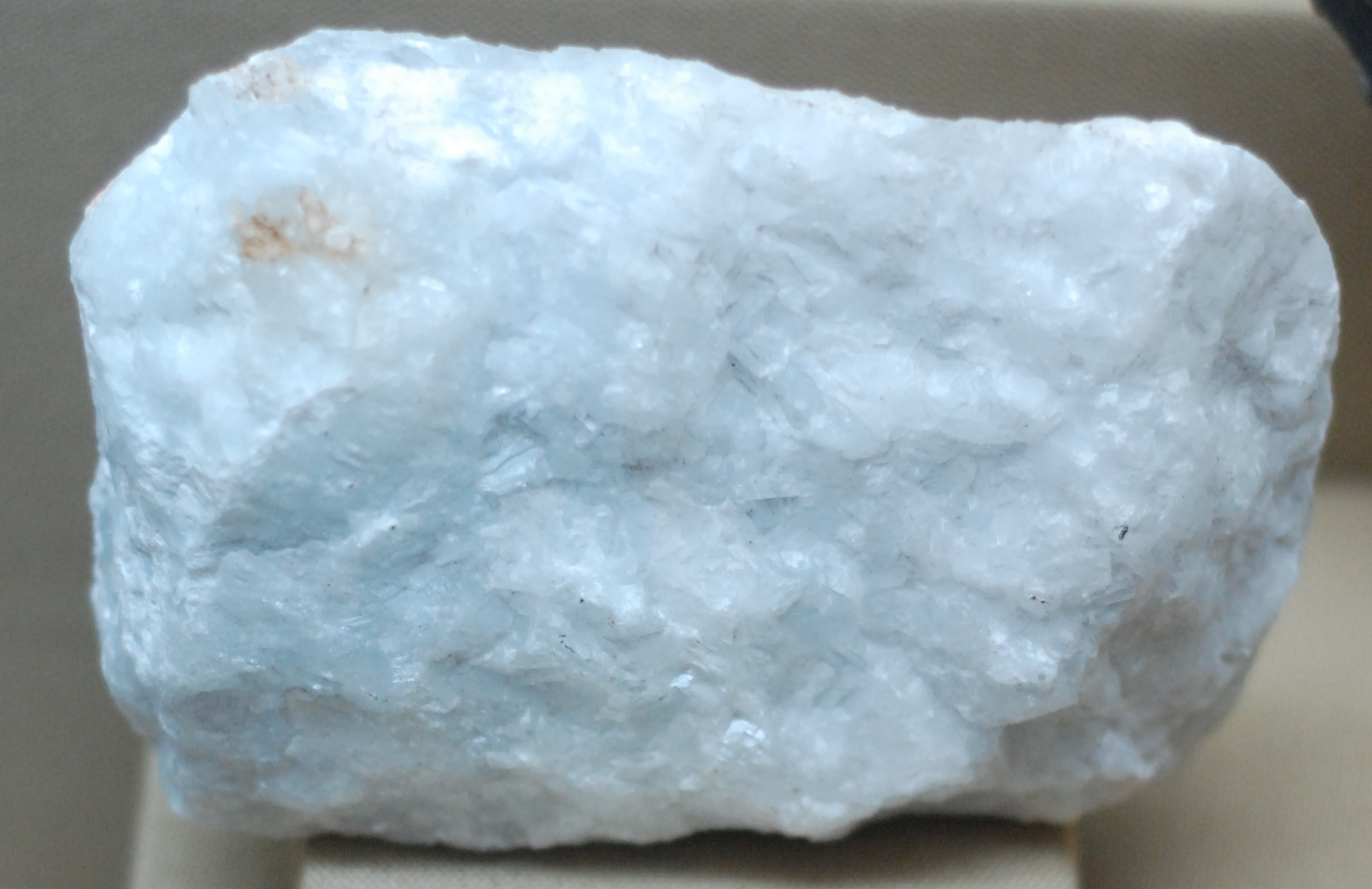 Mármol blanco. Roca metamórifica. Caliza metamorfizada por presión y temperatura, compuesta por cristales de carbonatos. Córdoba, Argentina.